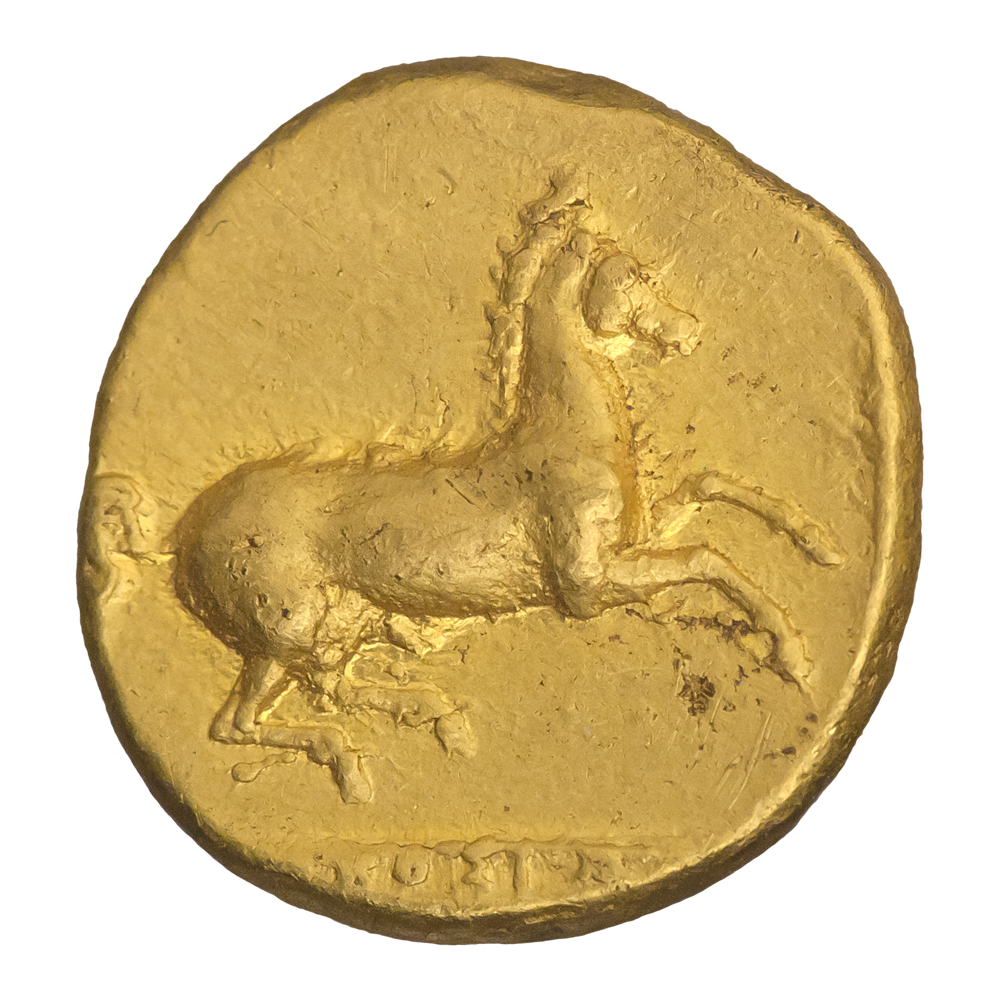 Сицилия. Сиракузы. Вторая демократия. Дионисий I (405—395 гг. до н.э.). Золотой тетробол (50 литр). Реверс. Скачущая лошадь, вправо. В обрезе надпись ΣΥΡΑΟΣΙΩΝ.